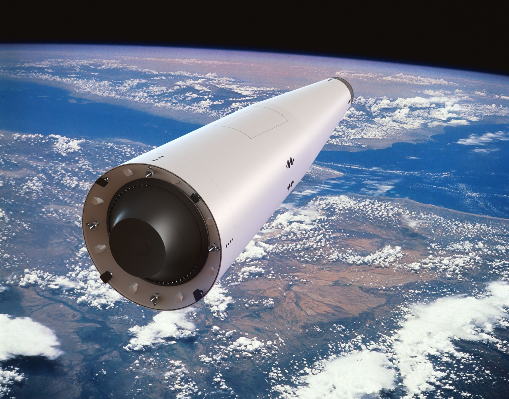 Одноступенчатая многоразовая РН КОРОНА в орбитальном полете с закрытым отсеком полезной нагрузки